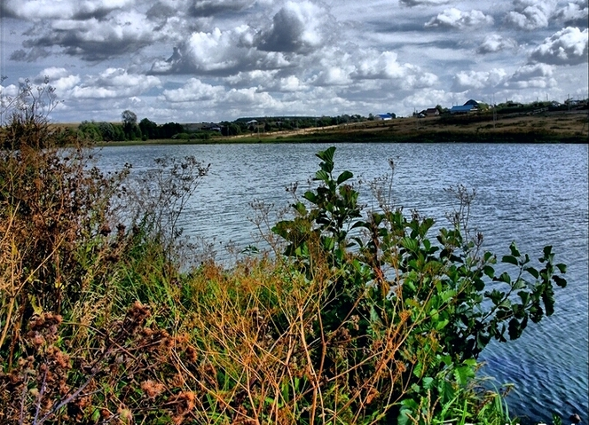 Спасское – село в Шатковском районе